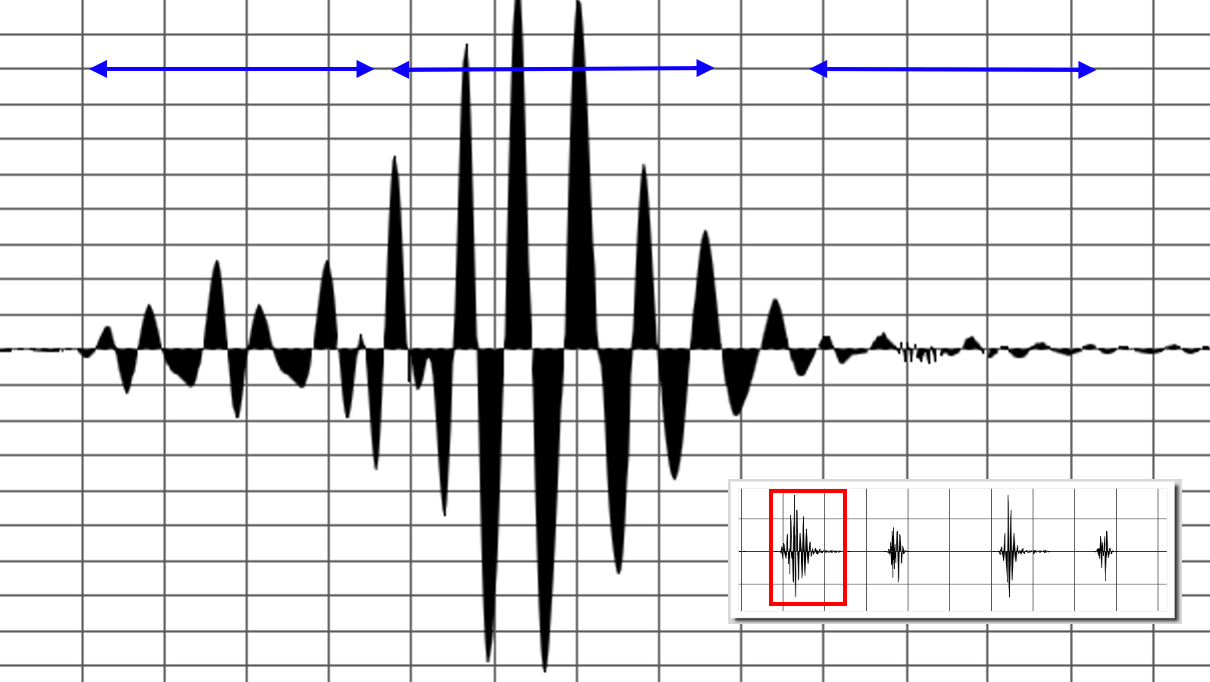 第一心音的波形